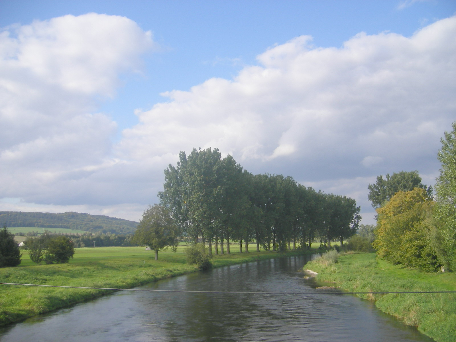 The Danube between Riedlingen and Zell